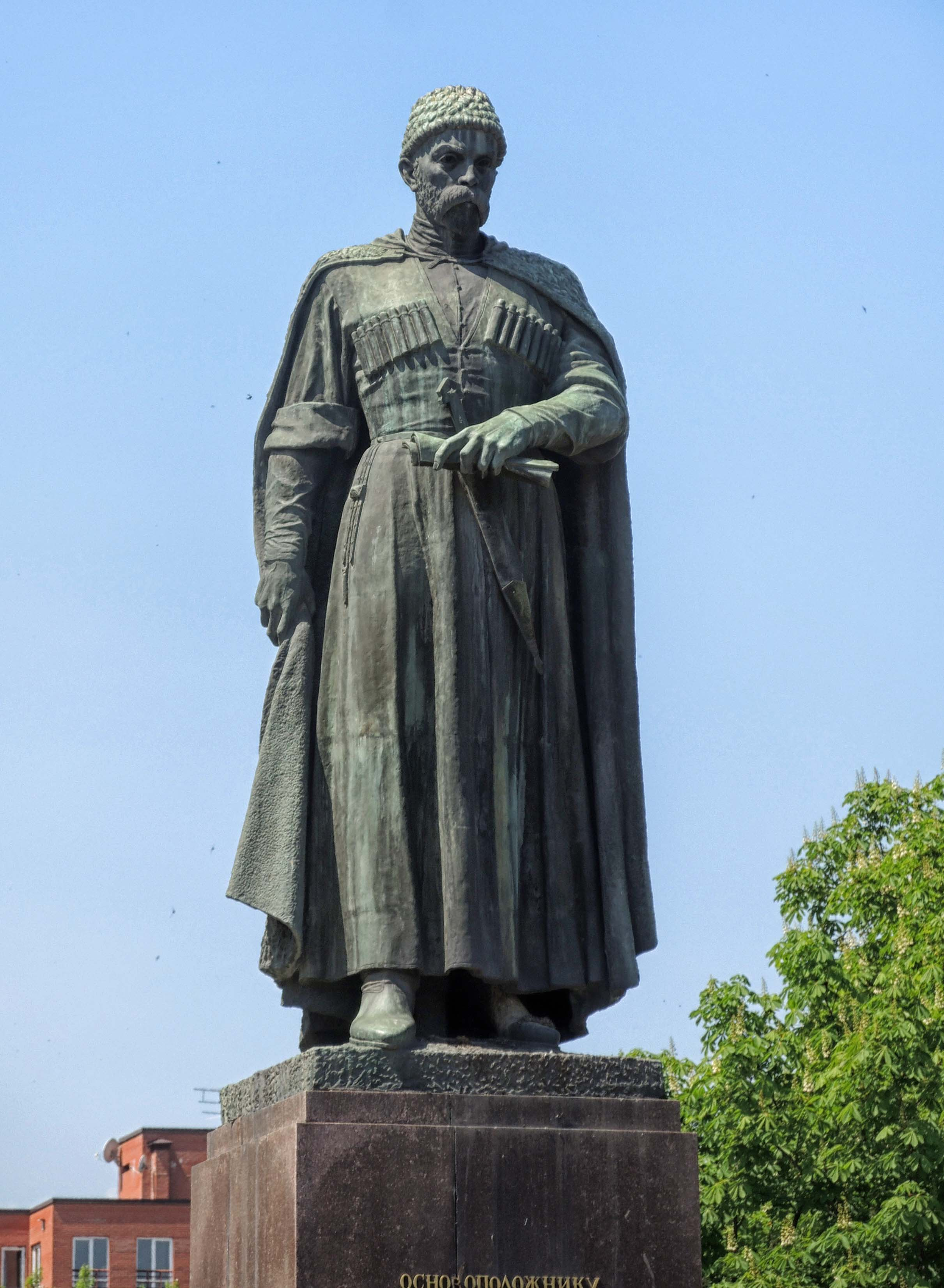 Памятник Хетагурову К.Л.: улица Карла Маркса, Владикавказ, Северная Осетия